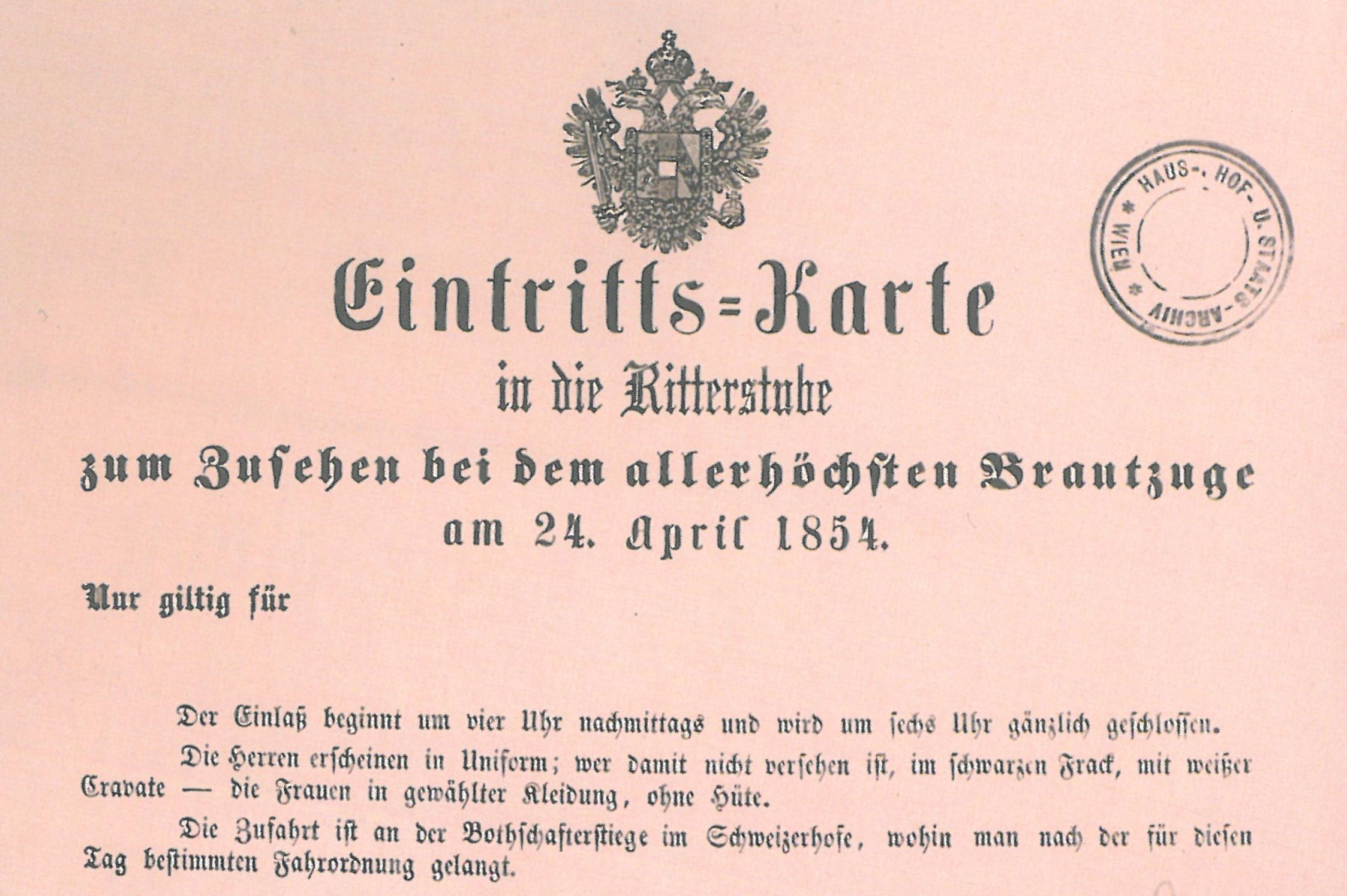 Carte d'entrée donnant accès aux salons de la Hofburg le jour du mariage de Frnçois-Joseph et Sissi